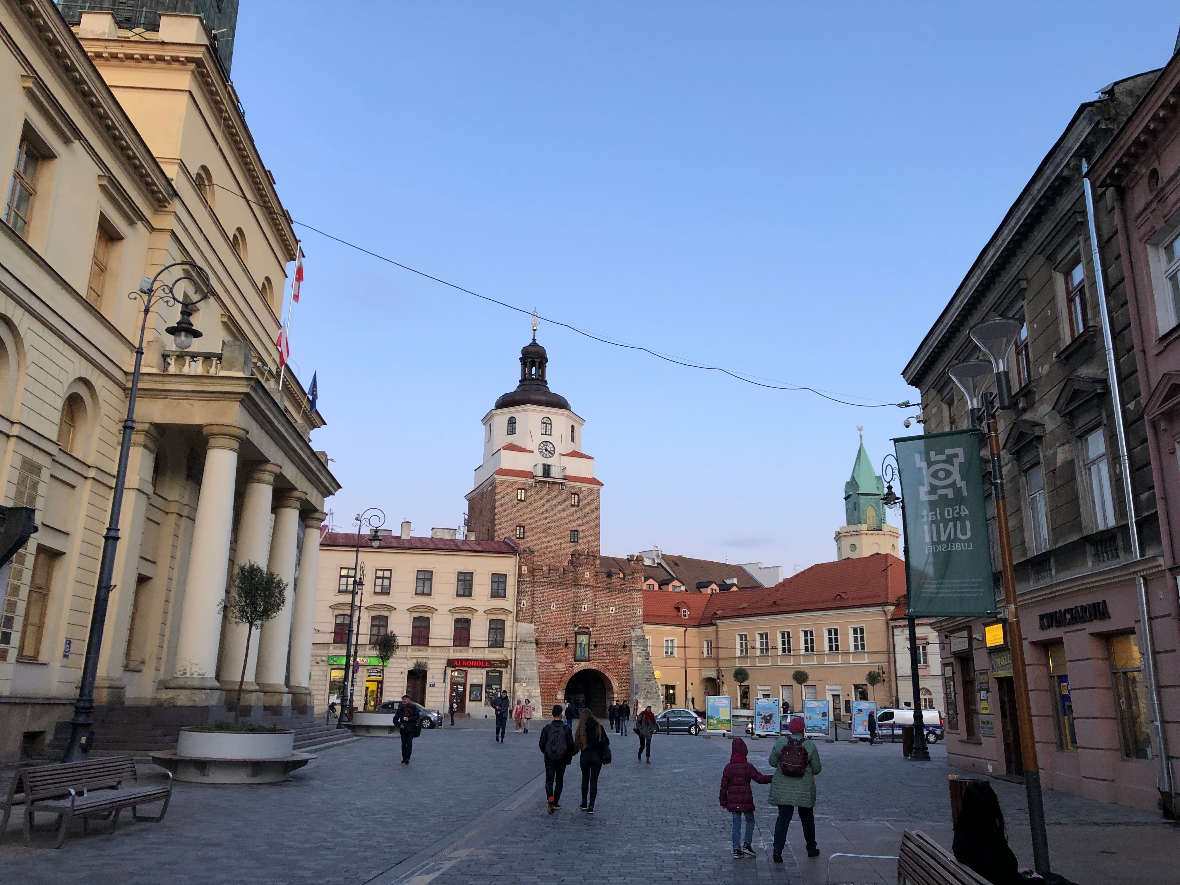 Краковские ворота Люблина